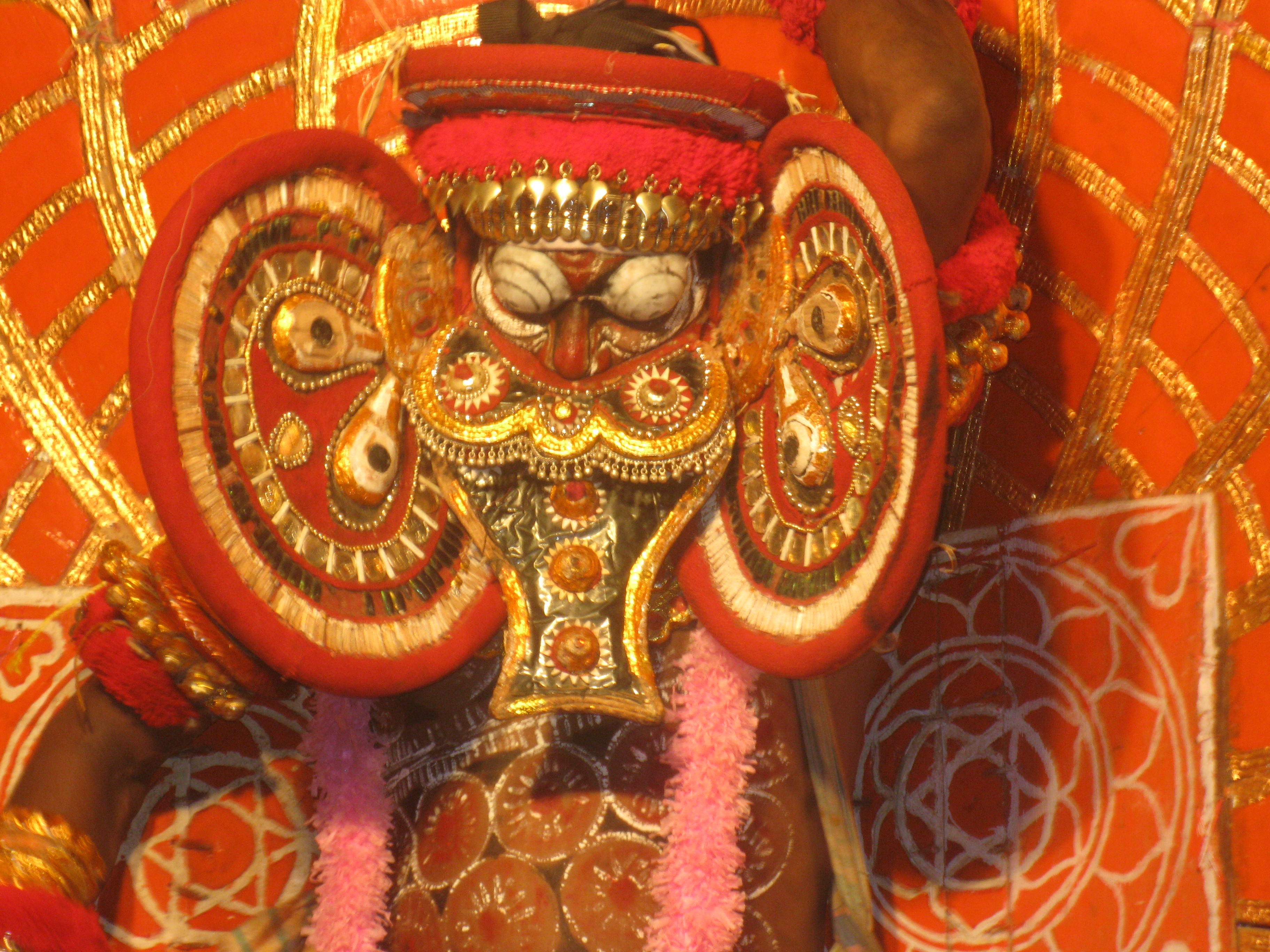 കുട്ടിച്ചാത്തൻ തെയ്യം